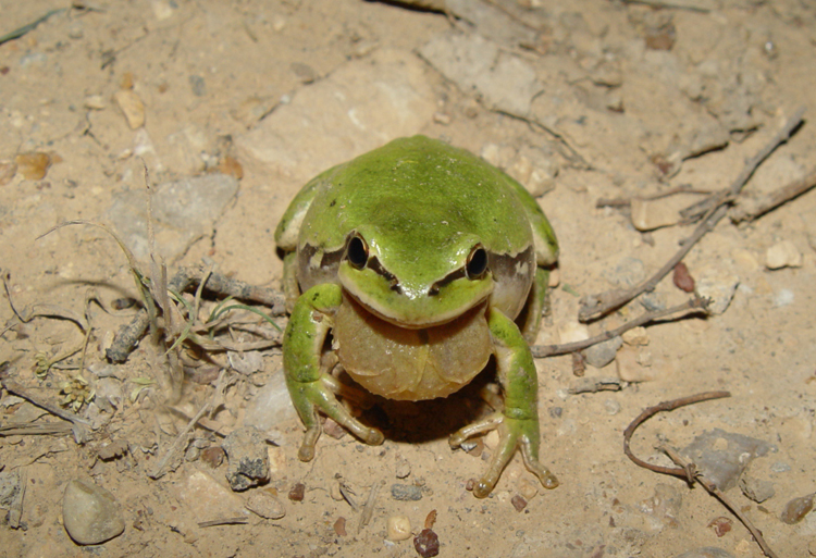 Hyla savignyi